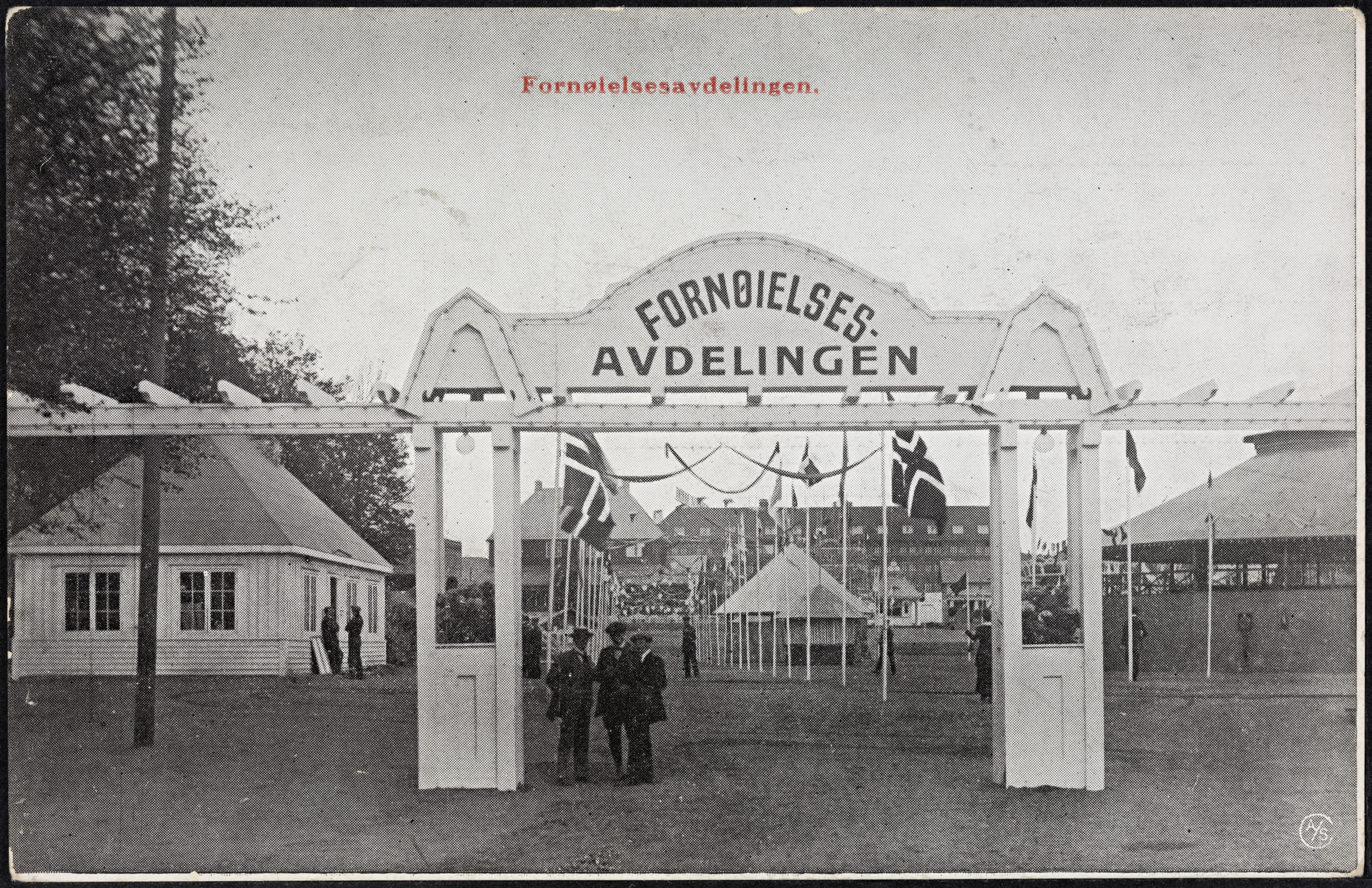 Beskrivelse / Description: Norges Jubilæumsutstilling 1914 Dato / Date: 1914 Sted / Place: Oslo, Frogner Fotograf / Photographer: ukjent / unknown Digital kopi av original / Digital copy of original: s/h postkort, trykt Eier / Owner Institution: Nasjonalbiblioteket / National Library of Norway Lenke / Link: Bildesignatur / Image Number: bldsa_PK10215